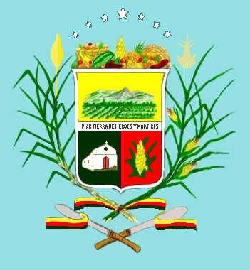 Escudo del municipio Piar, estado Monagas, Venezuela